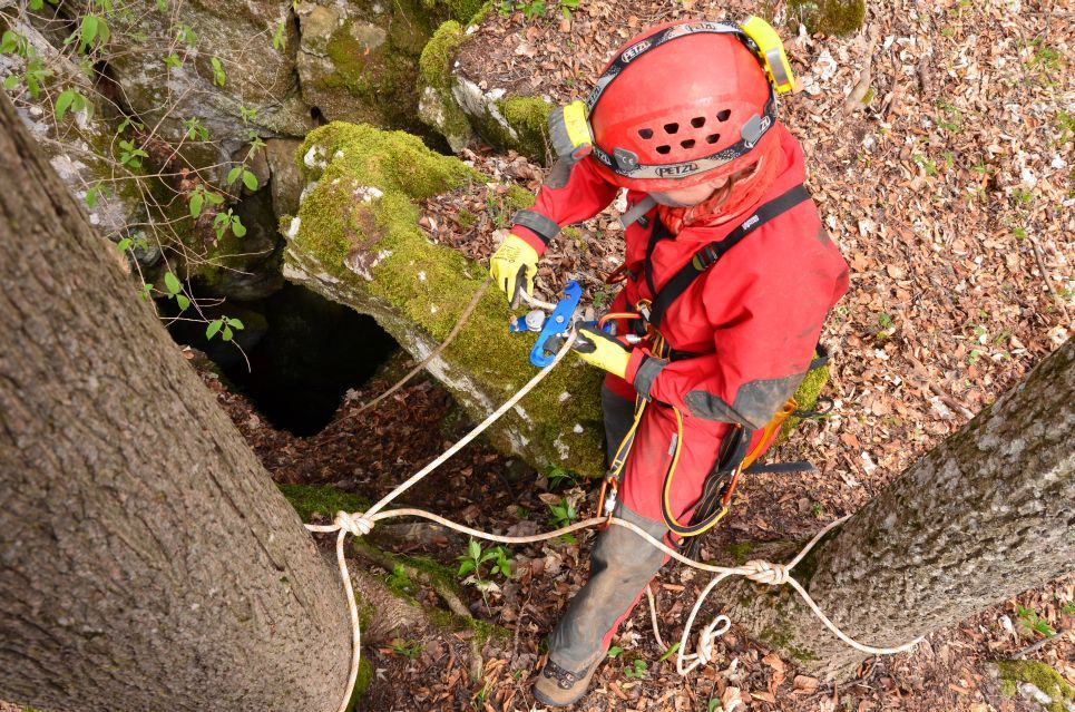 Speleologický prieskum priepastí sa vykonáva speleologickou jednolanovou technikou. Horný vrch patrí k najlepšie preskúmaným krasovým územiam na Slovensku. K roku 2015 je tu známych 250 jaskýň rôznych morfogenetických typov.